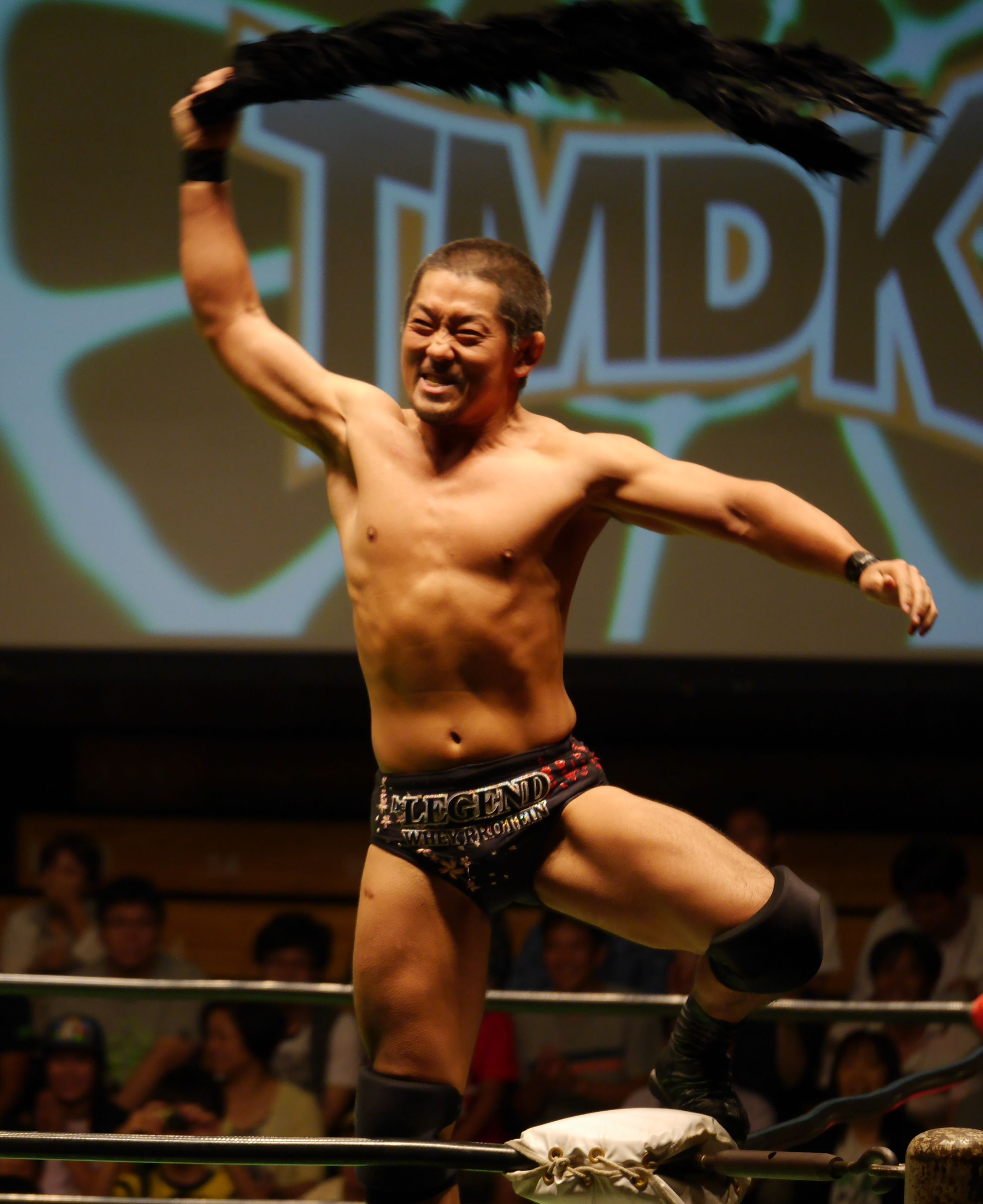 2015/08/22 ノア後楽園